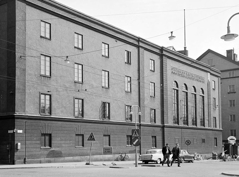 Östermalmsstationen